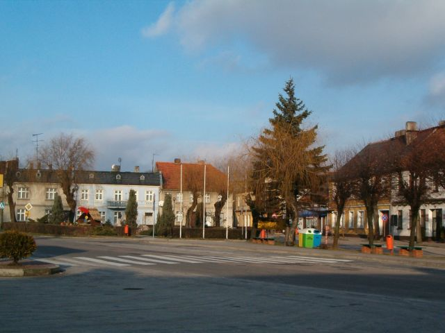 Polska, woj. wielkopolskie, Dobrzyca, Rynek